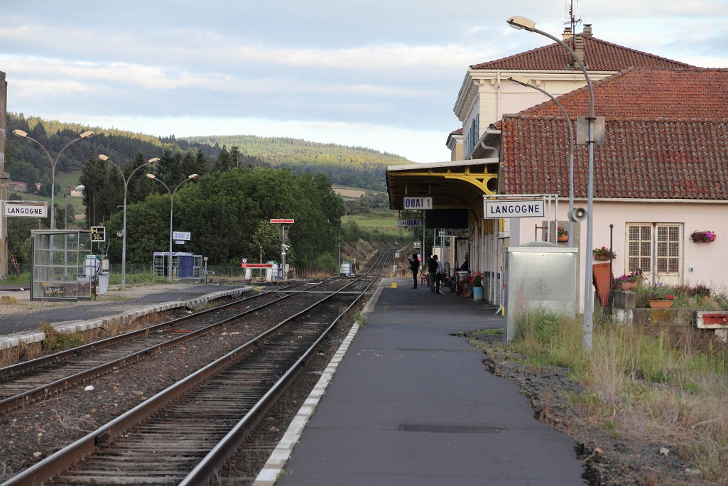 La gare de Langogne en août 2011, Lozère, France.